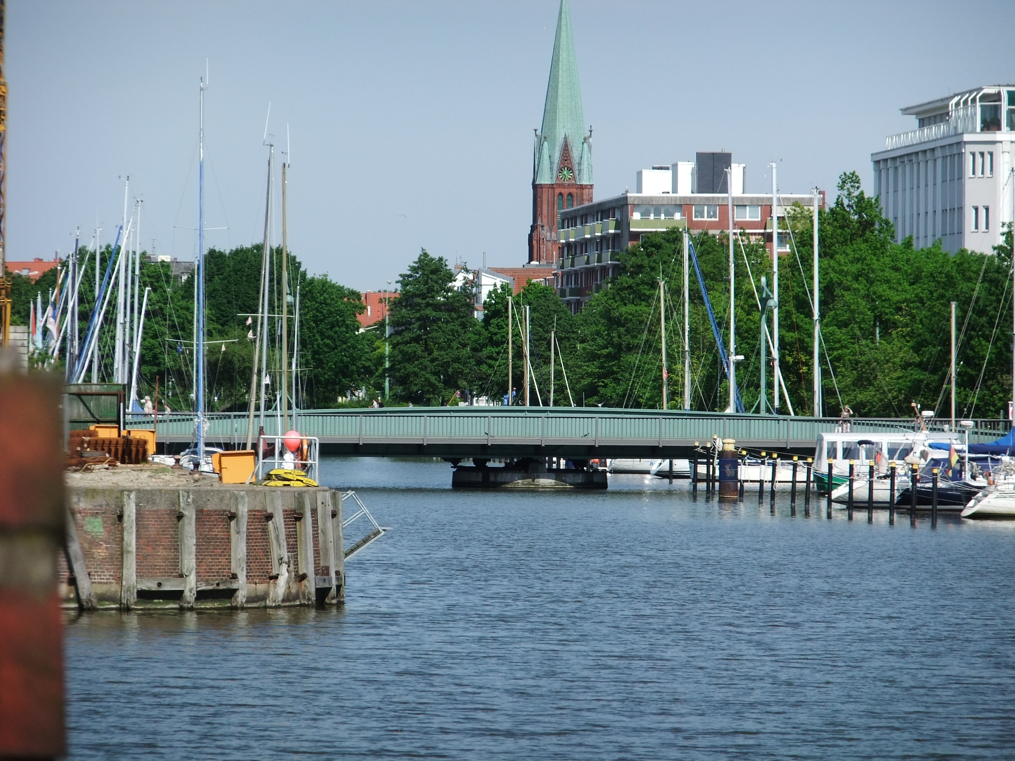 Brücke in Bremerhaven, Klußmannstraße.Das abgebildete Objekt ist ein geschütztes Kulturdenkmal in der Freien Hansestadt Bremen, mit der Nr. 3120 beim Landesamt für Denkmalpflege registriert.